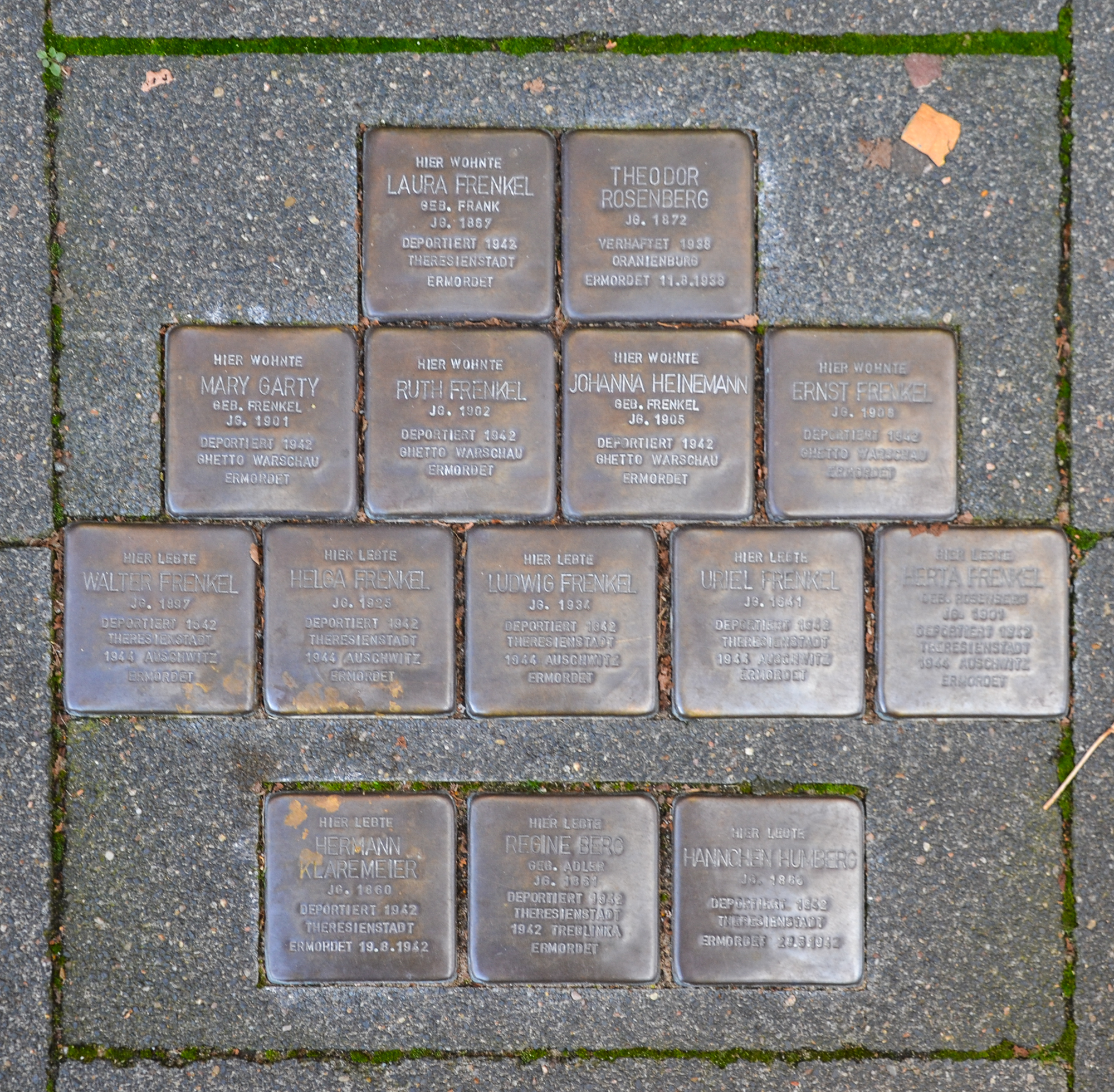 Stolpersteine Laura Frenkel, Theodor Rosenberg, Mary Garty, Ruth Frenkel, Johanna Heinemann, Ernst Frenkel, Walter Frenkel, Helga Frenkel, Ludwig Frenkel, Uriel Frenkel, Herta Frenkel, Hermann Klaremeier, Regine Berg und Hannchen Humberg